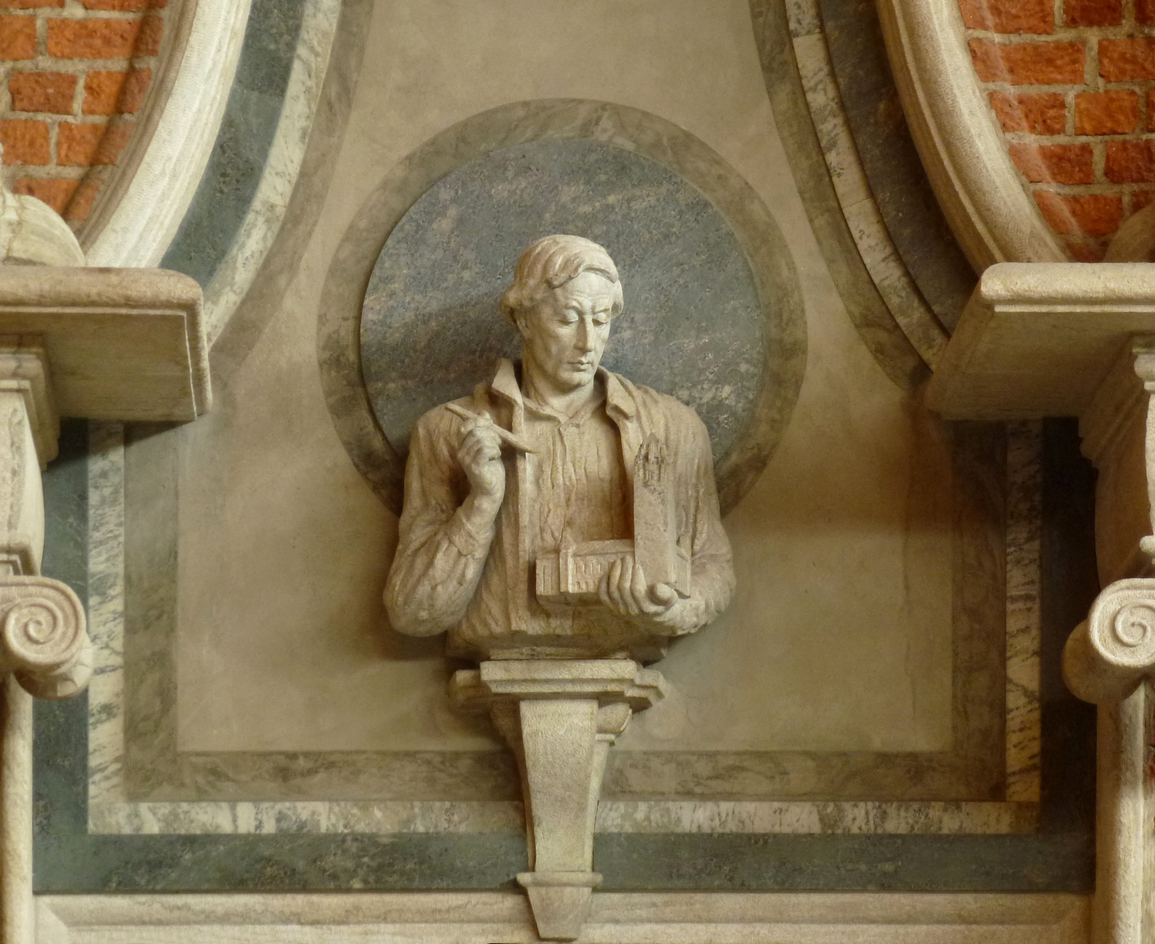 Stadshuset Ragnar Östberg byst